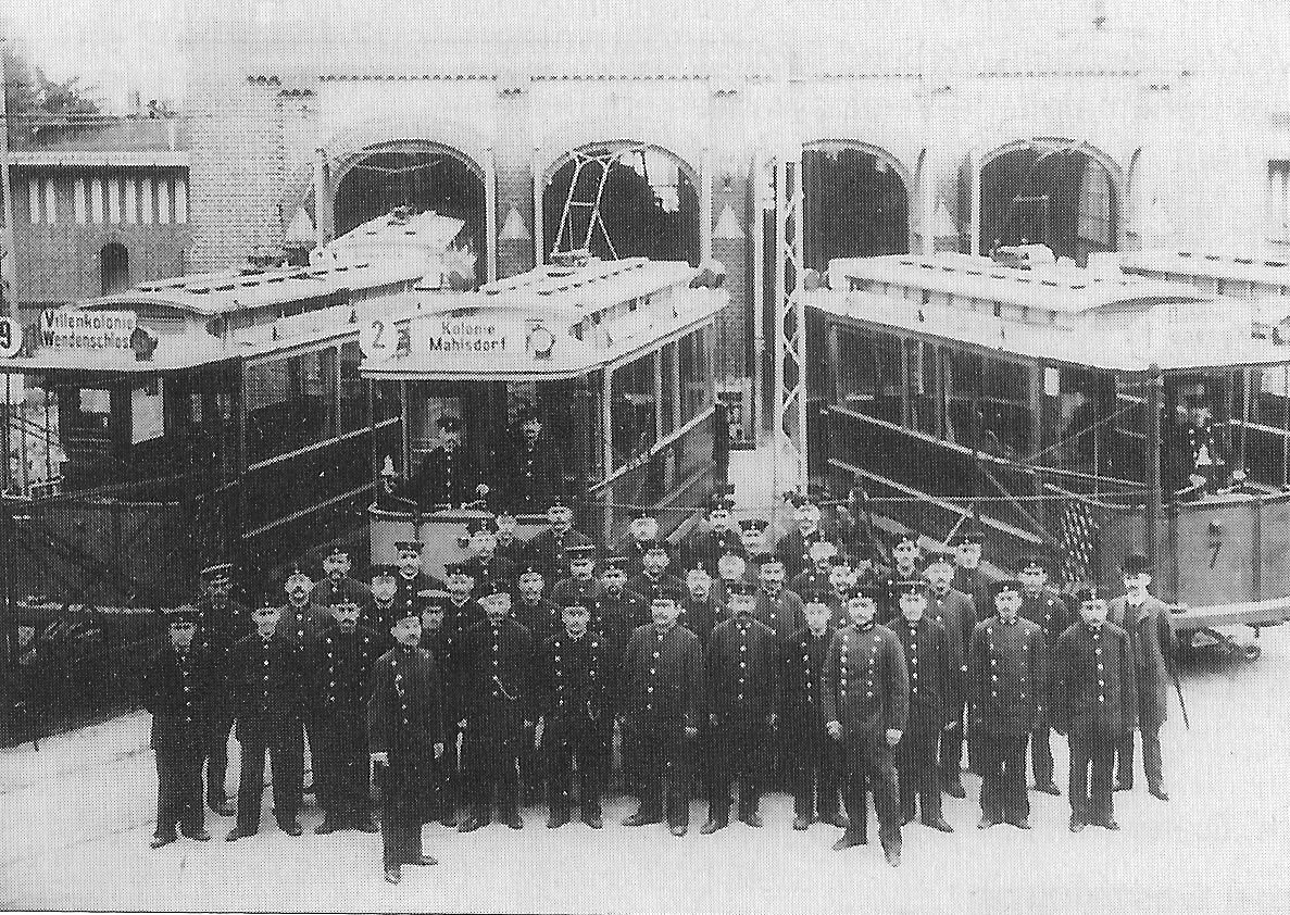 Personal der Städtischen Straßenbahn Cöpenick mit drei Triebwagen vorm Betriebshof Cöpenick